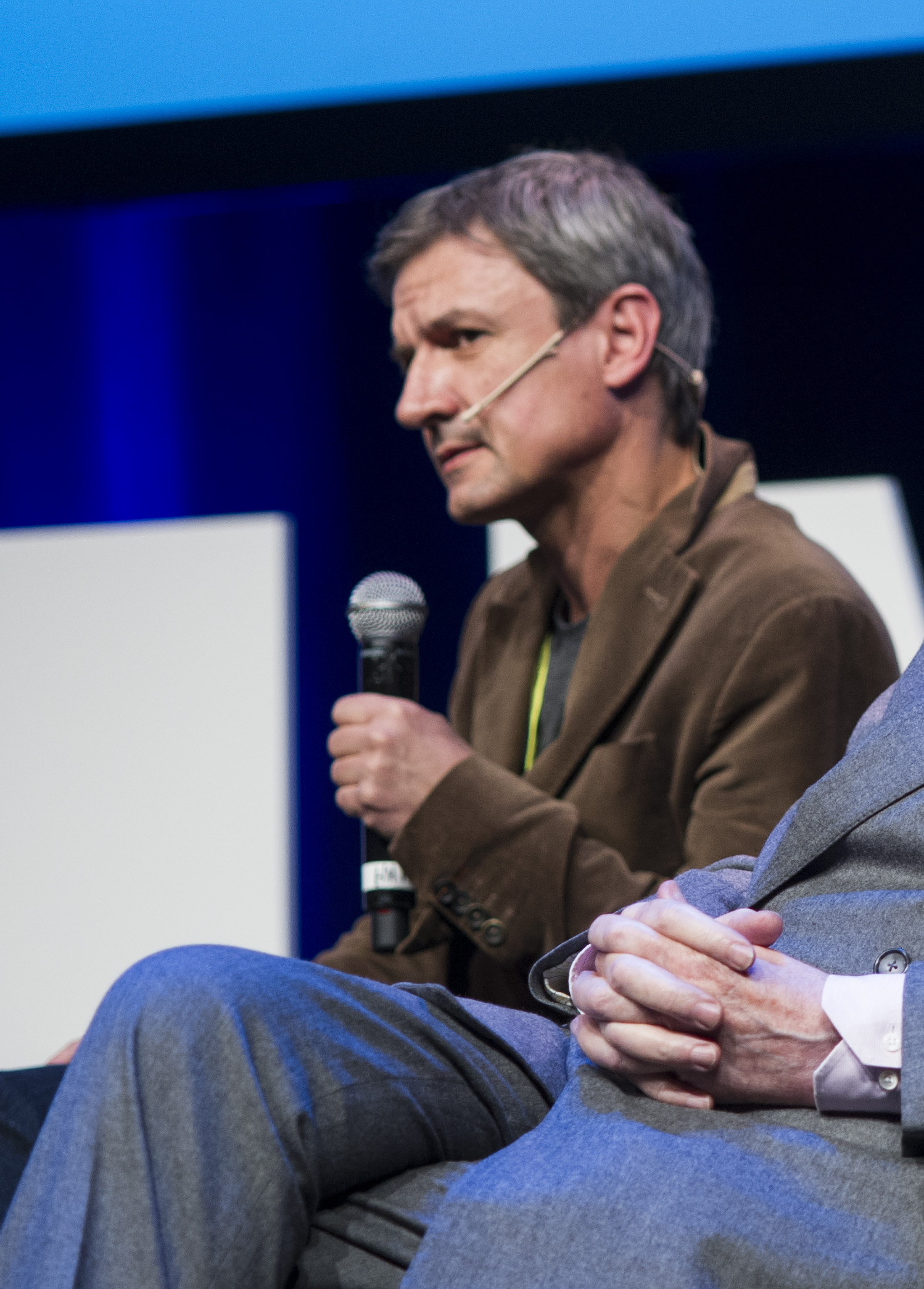 Petter S. Rosenlund og John M. Jacobsen